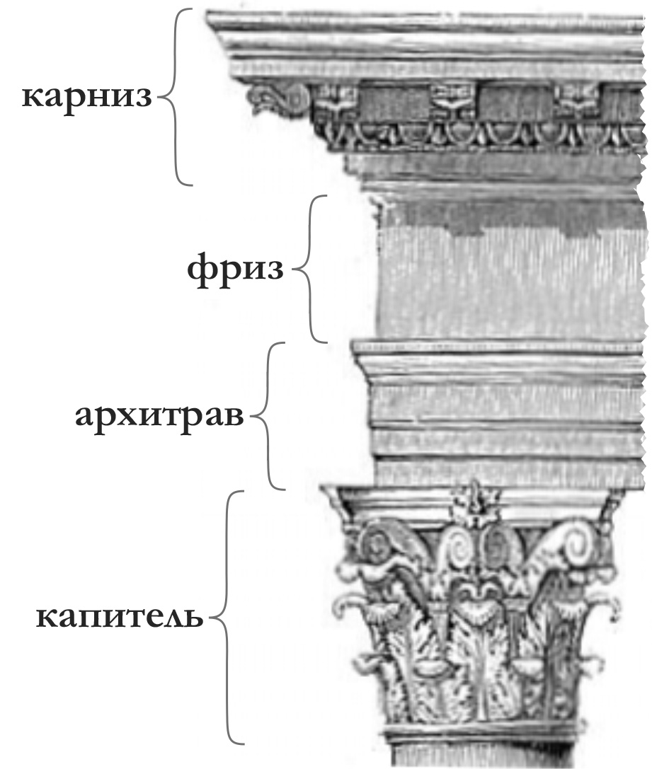 Иллюстрация антаблемента